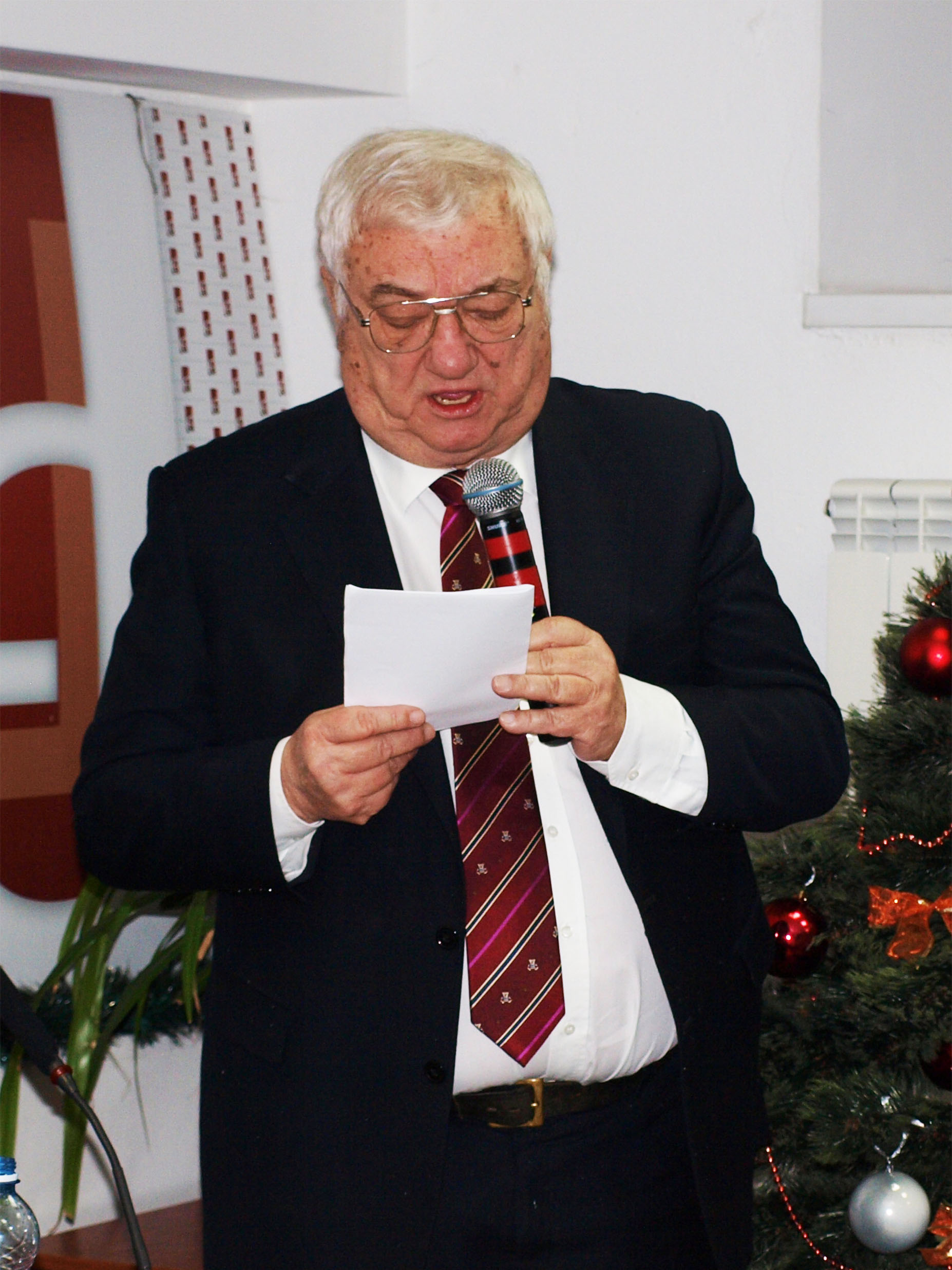 Юрій Щербак - український письменник, політик, діяч екологічного руху, дипломат. Виступ у книгарні "Є" (Київ)